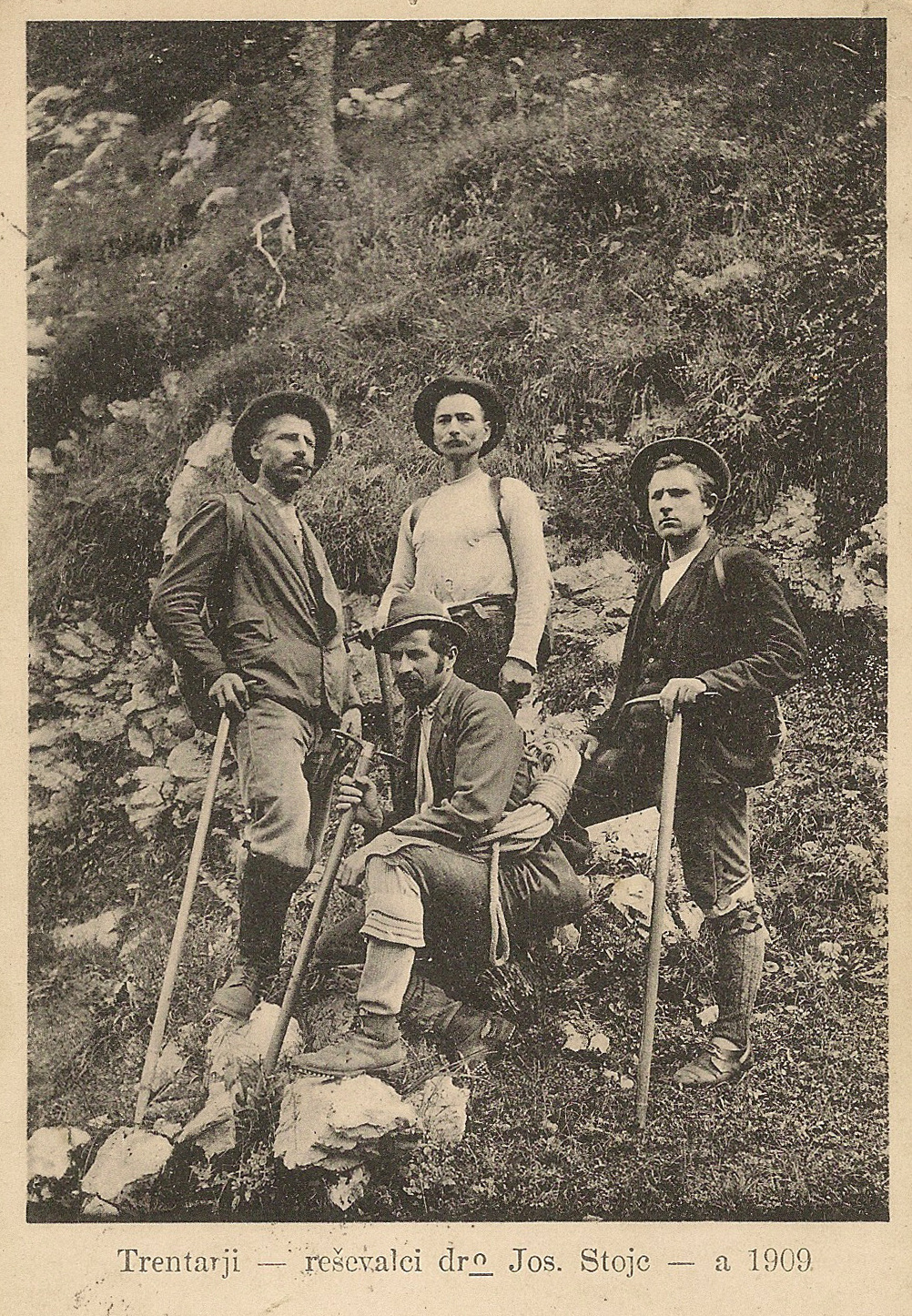 Trentarski vodniki.